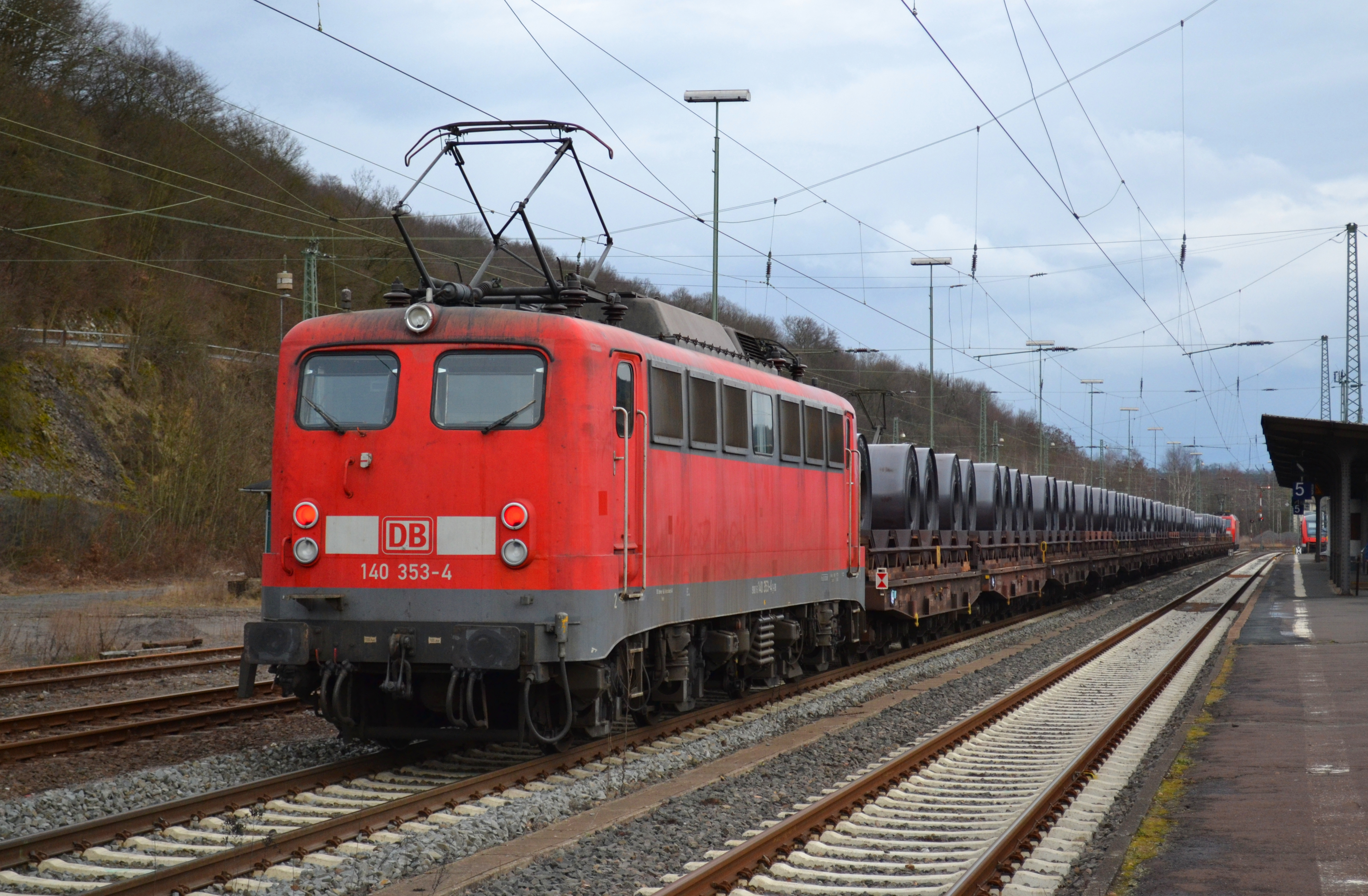 Ein Coilzug aus Bochum Nord mit Coils für das Dillenburger Stahlwerk bei der Ankunft in Dillenburg. Am Zugschluss leistet meistens eine zweite Lokomotive auf Grund des hohen Zuggewichtes und der Steigungen im Siegerland Schiebedienst.